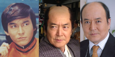 西田健の画像